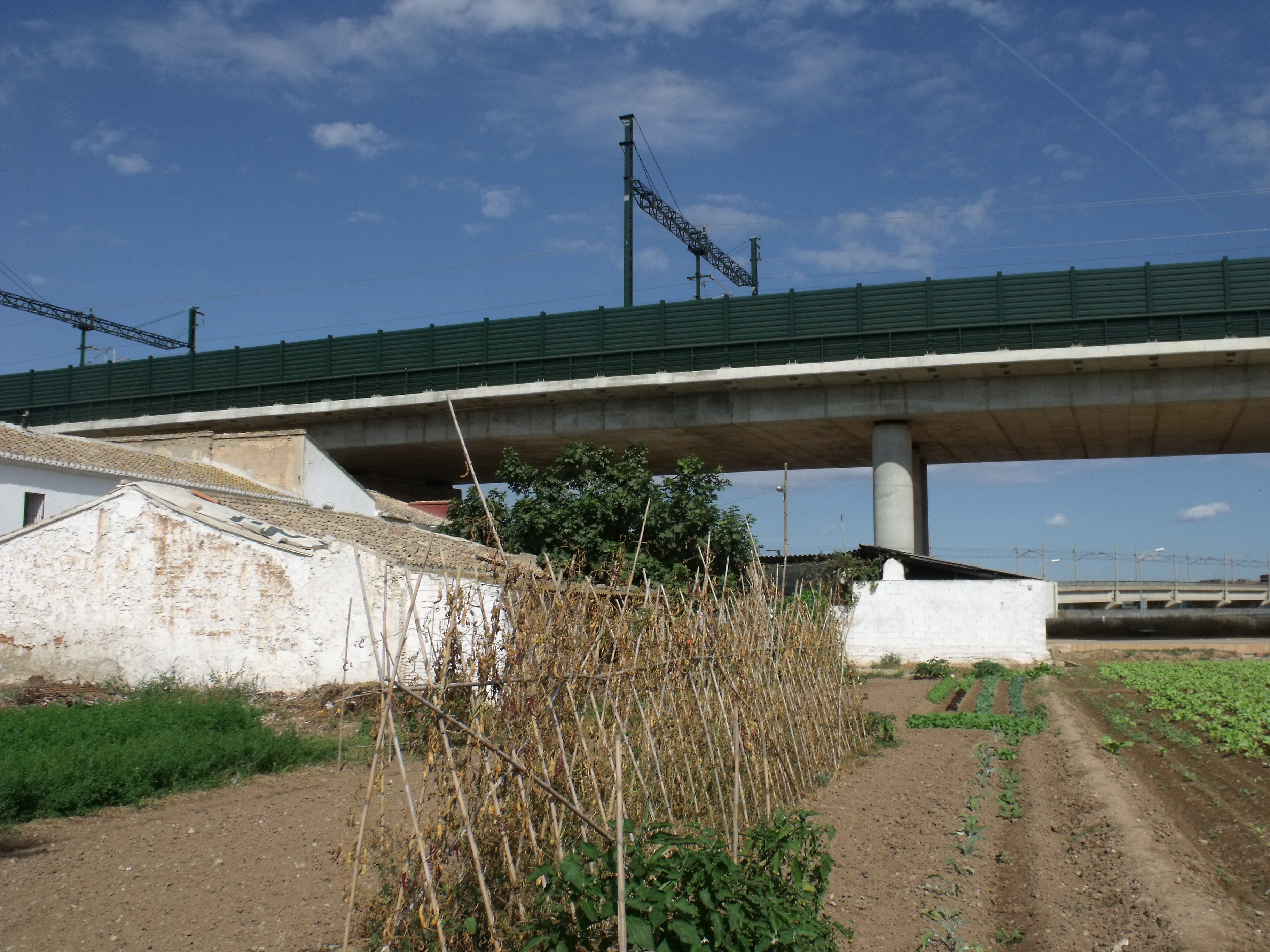 Alqueria Aiguamolls i Casa Maso.